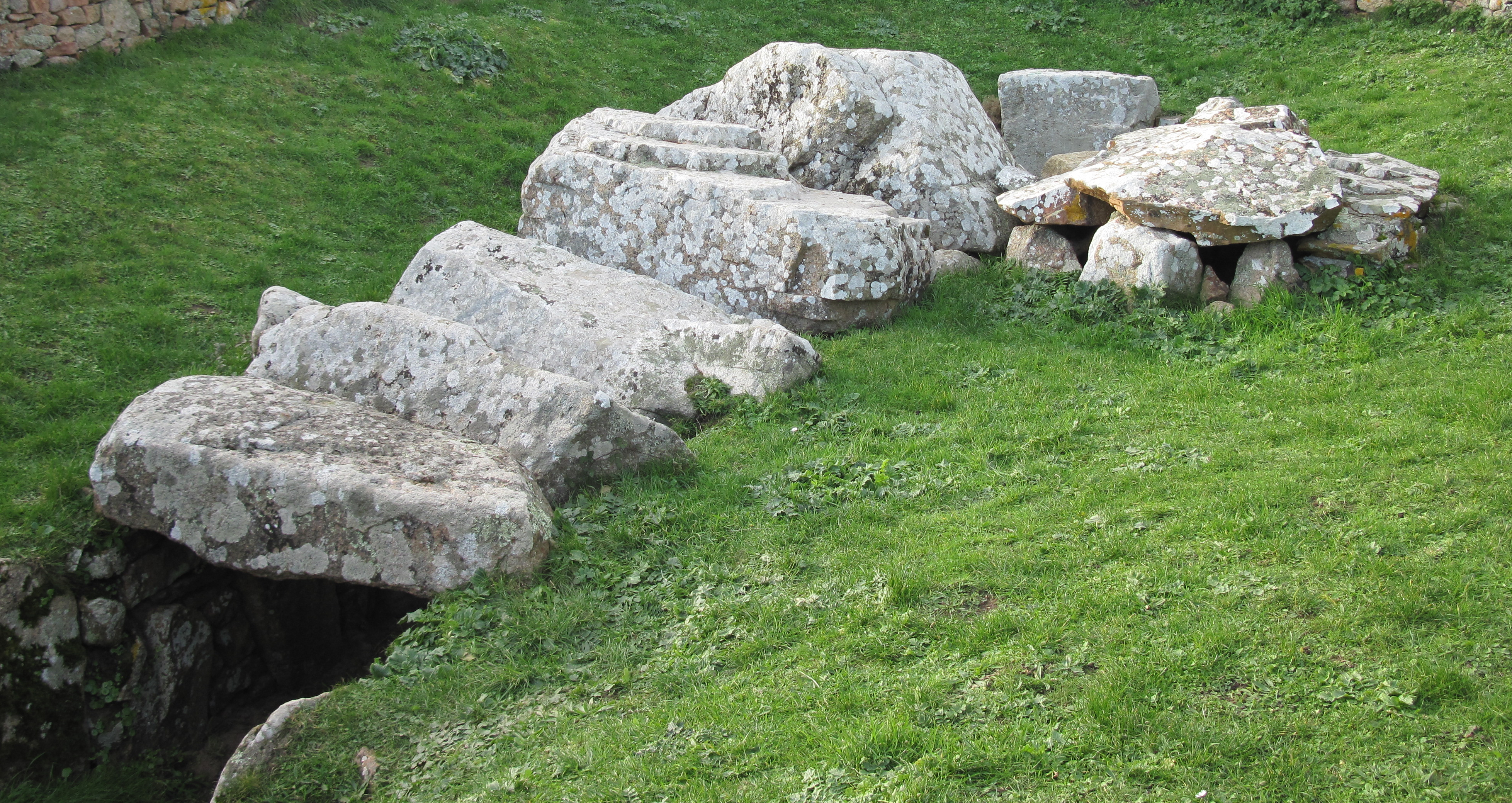 Nrf: Pouquelaye des Monts, Grantez, Saint Ouën, Jèrri